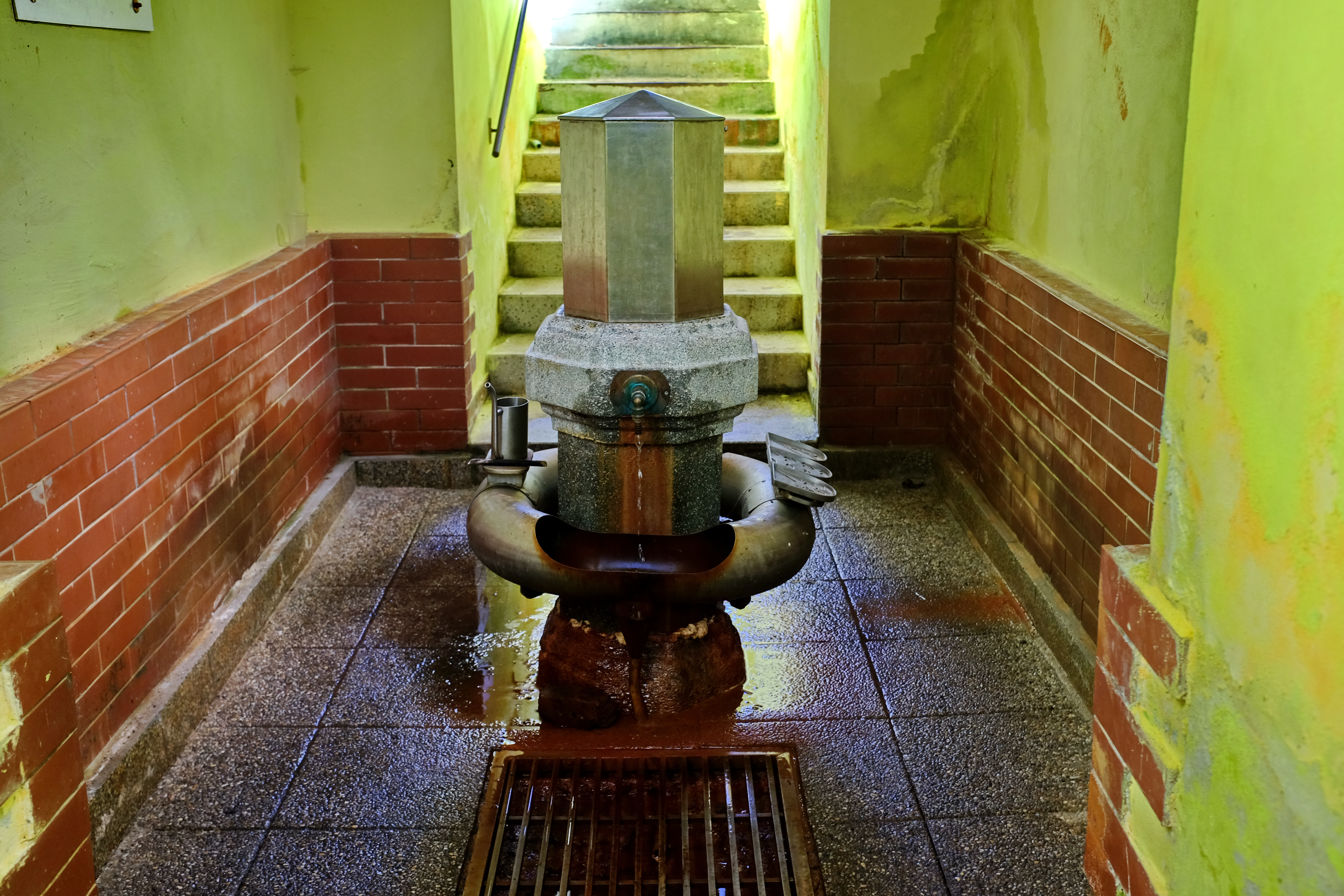 Minerální pramen v Dolních Pasekách, Smrčiny, okres Cheb